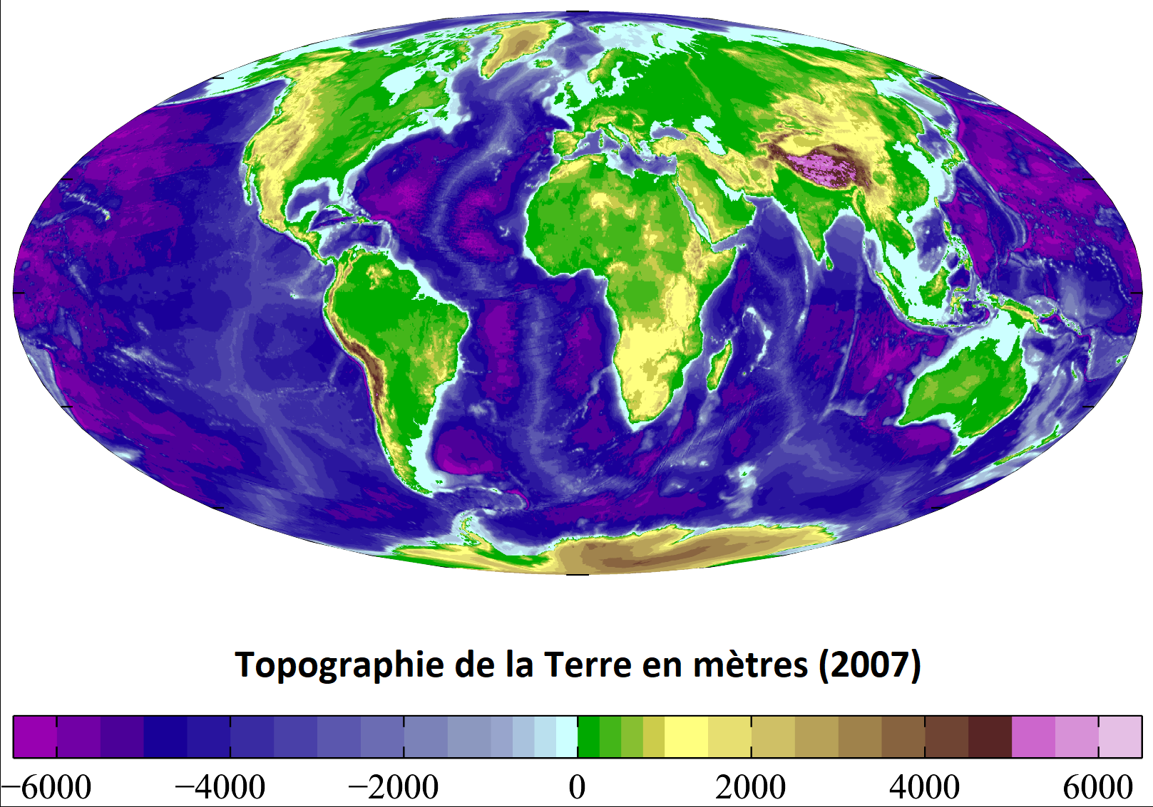 Topographie et bathymétrie de la Terre actuelle avec une résolution horizontale de 15 minutes. Tiré des données du National Geophysical Data Center. Projection de Mollweide.